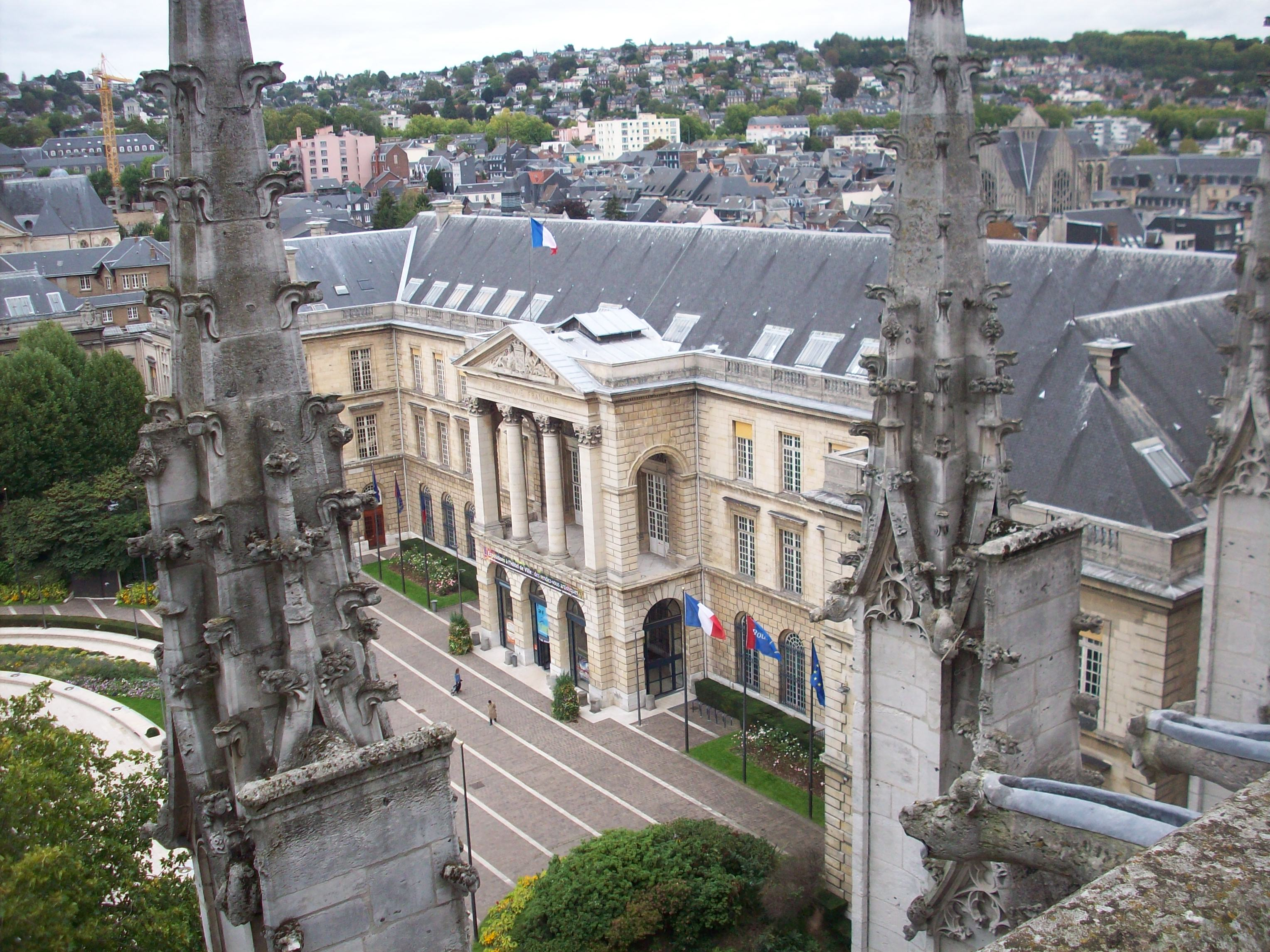 Vue de l'hôtel de ville depuis la gouttière nord de la nef.